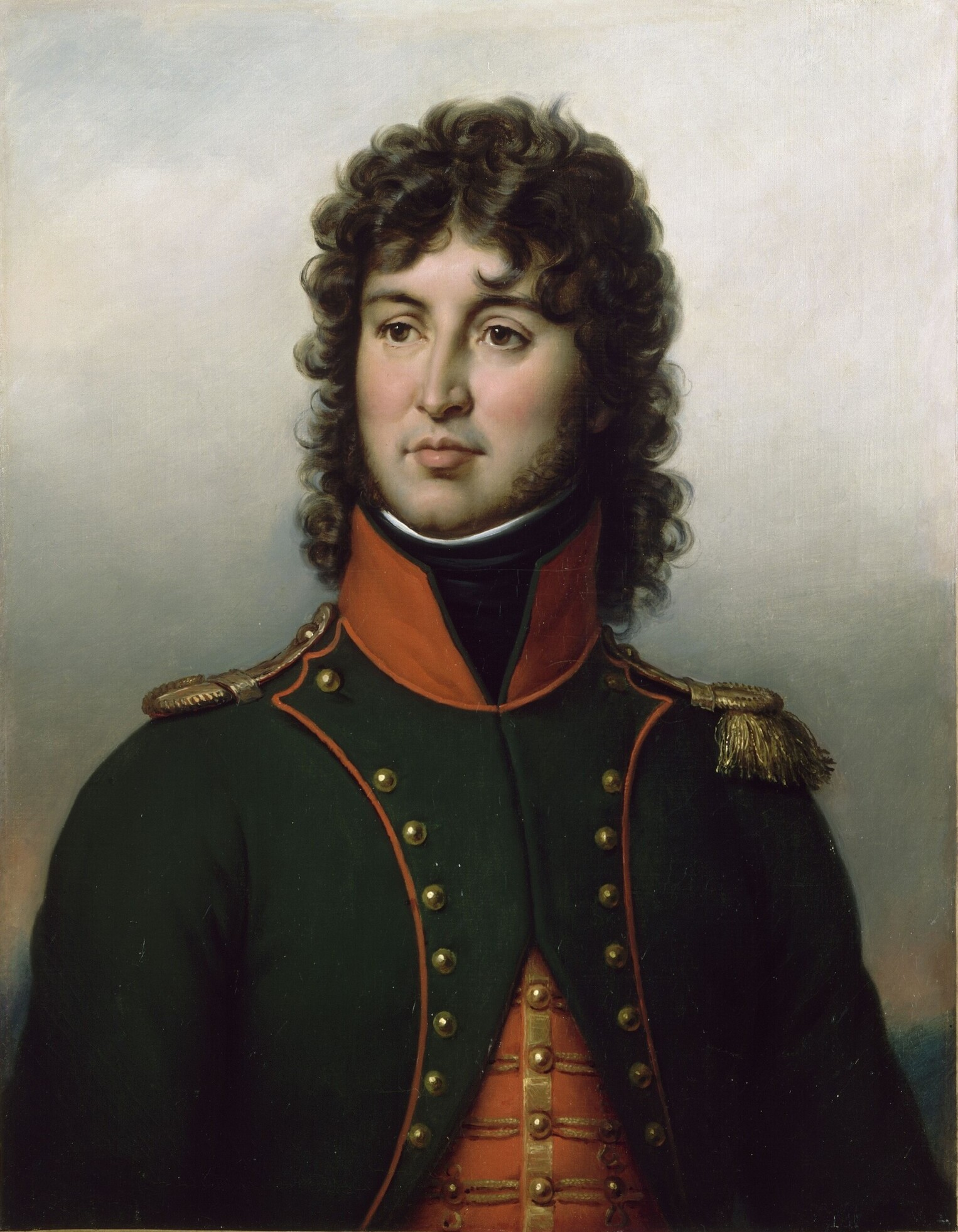 Commandé par Louis-Philippe pour le musée historique de Versailles en 1835